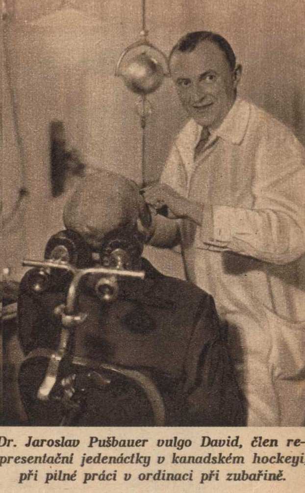 Pušbauer Jaroslav, československý hokejový obránce a lékař